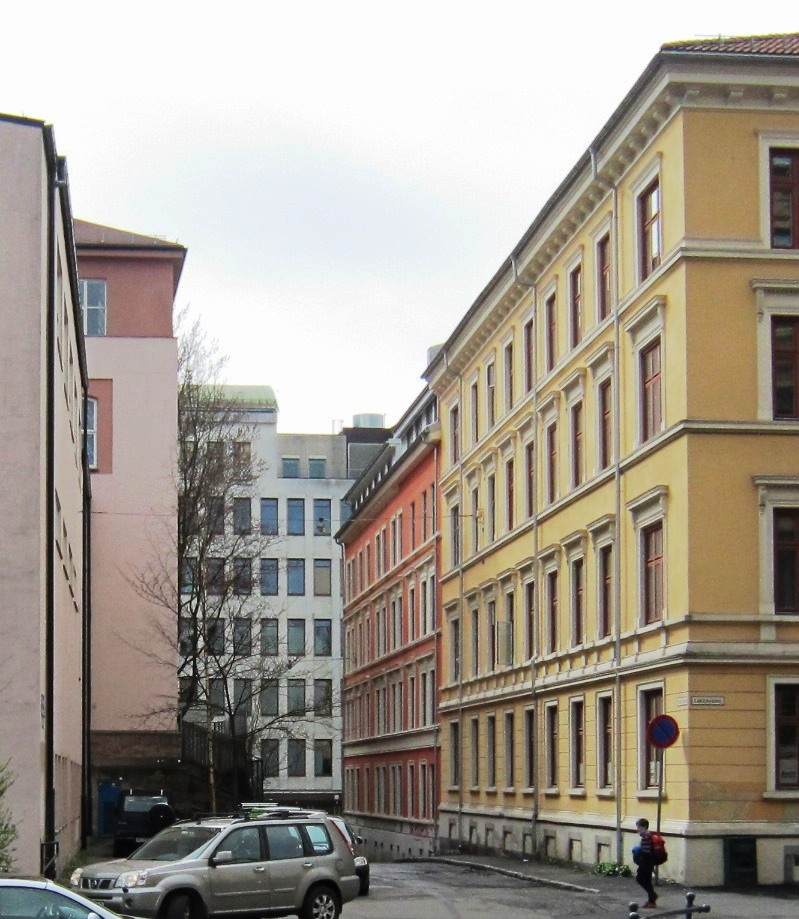 Krogs gate ved Ruseløkka skole